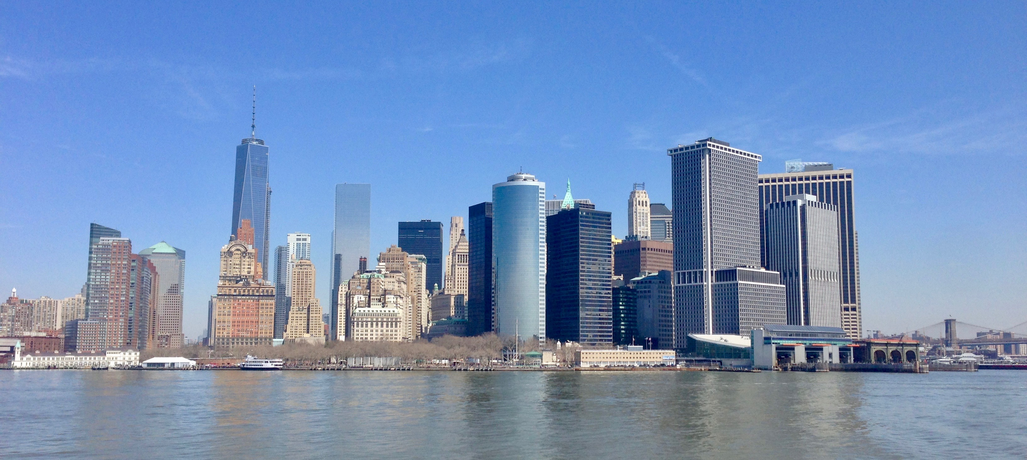 Undetermined language : Manhattanin rahoituslaitosten keskittymä New Yorkissa.